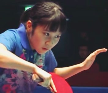 HiranoMiu